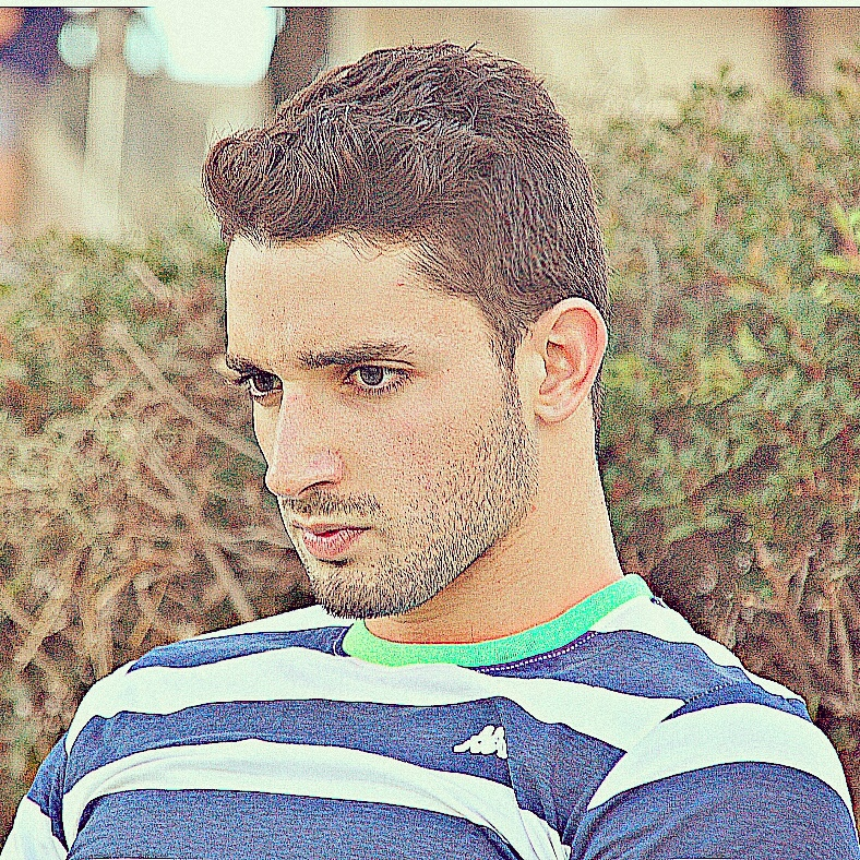 אליפות הארץ בשחייה קיץ 2014